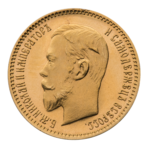 Пять рублей 1907 г. (аверс). Биткин 33 (R3). Профильный портрет императора, влево. Круговая надпись: Б. М.НИКОЛАЙ II ИМПЕРАТОРЪ И САМОДЕРЖЕЦЪ ВСЕРОСС. Зубчатый ободок по краю.